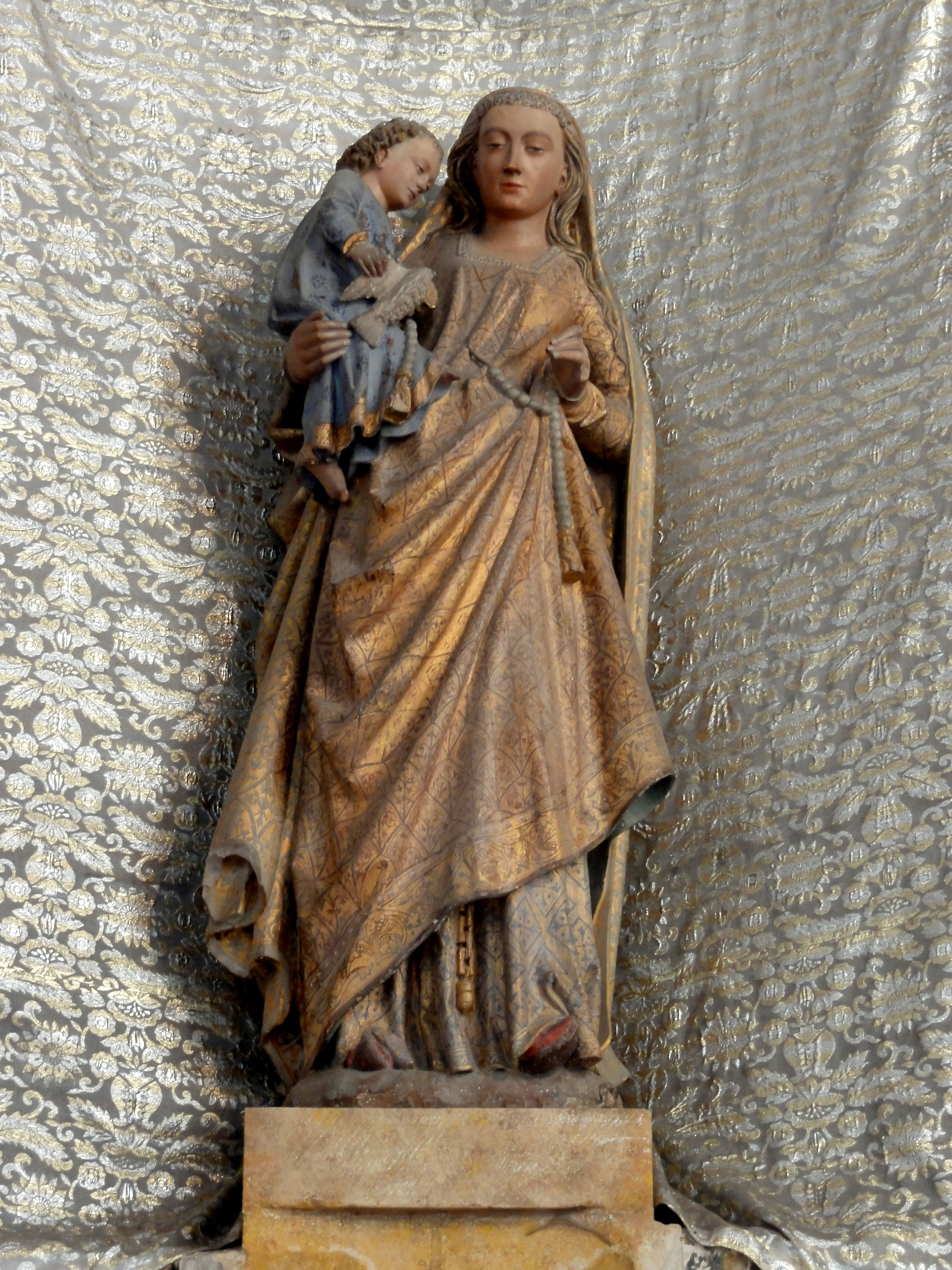 Vierge à l'Enfant dite N.D. de Bon-Secours, aujourd'hui dans la chapelle du Saint-Sacrement.